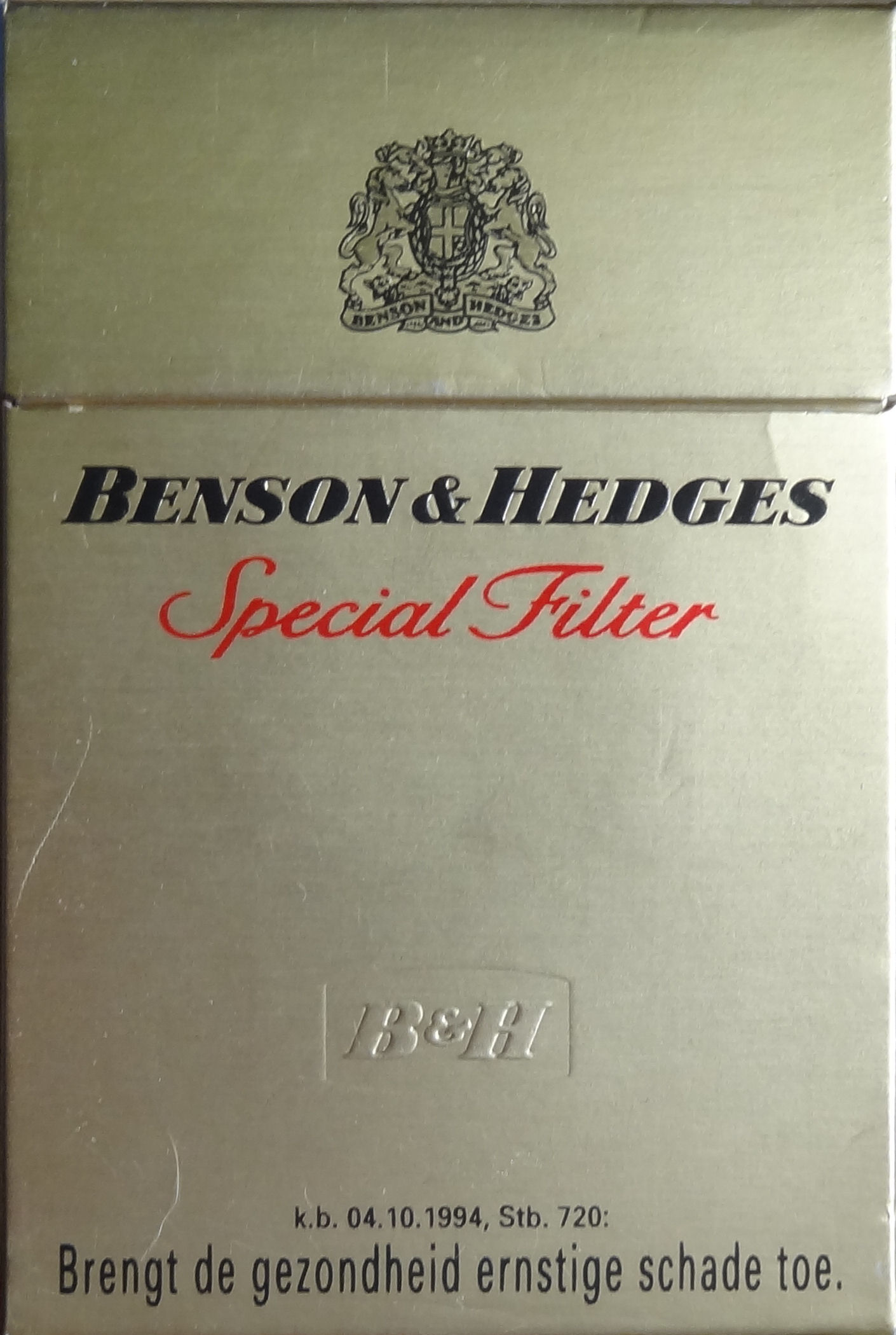 oude verpakking